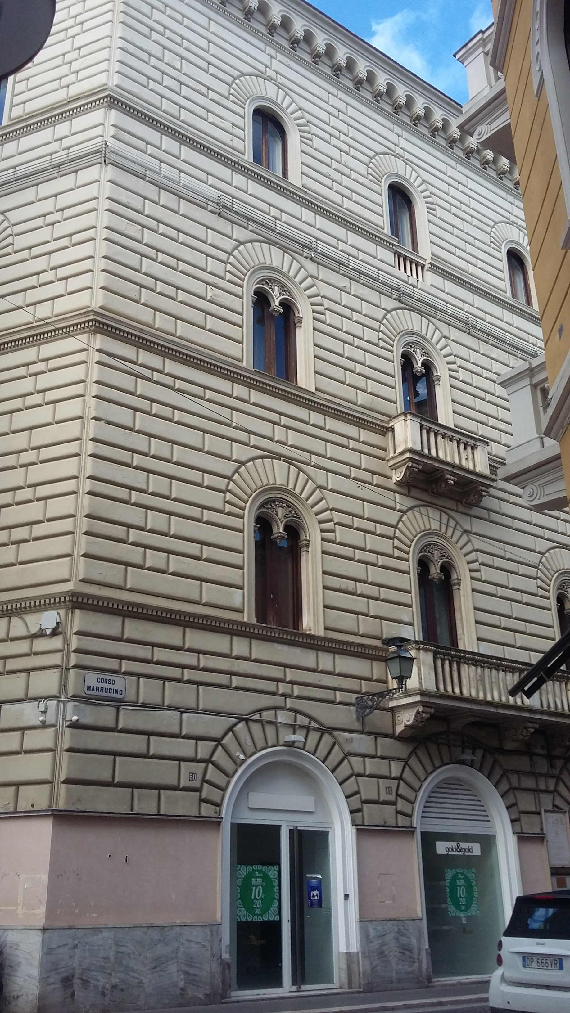 Palazzo Henrici (Chieti, Largo Mercatello) fu la dimora dell' omonima e nobile famiglia